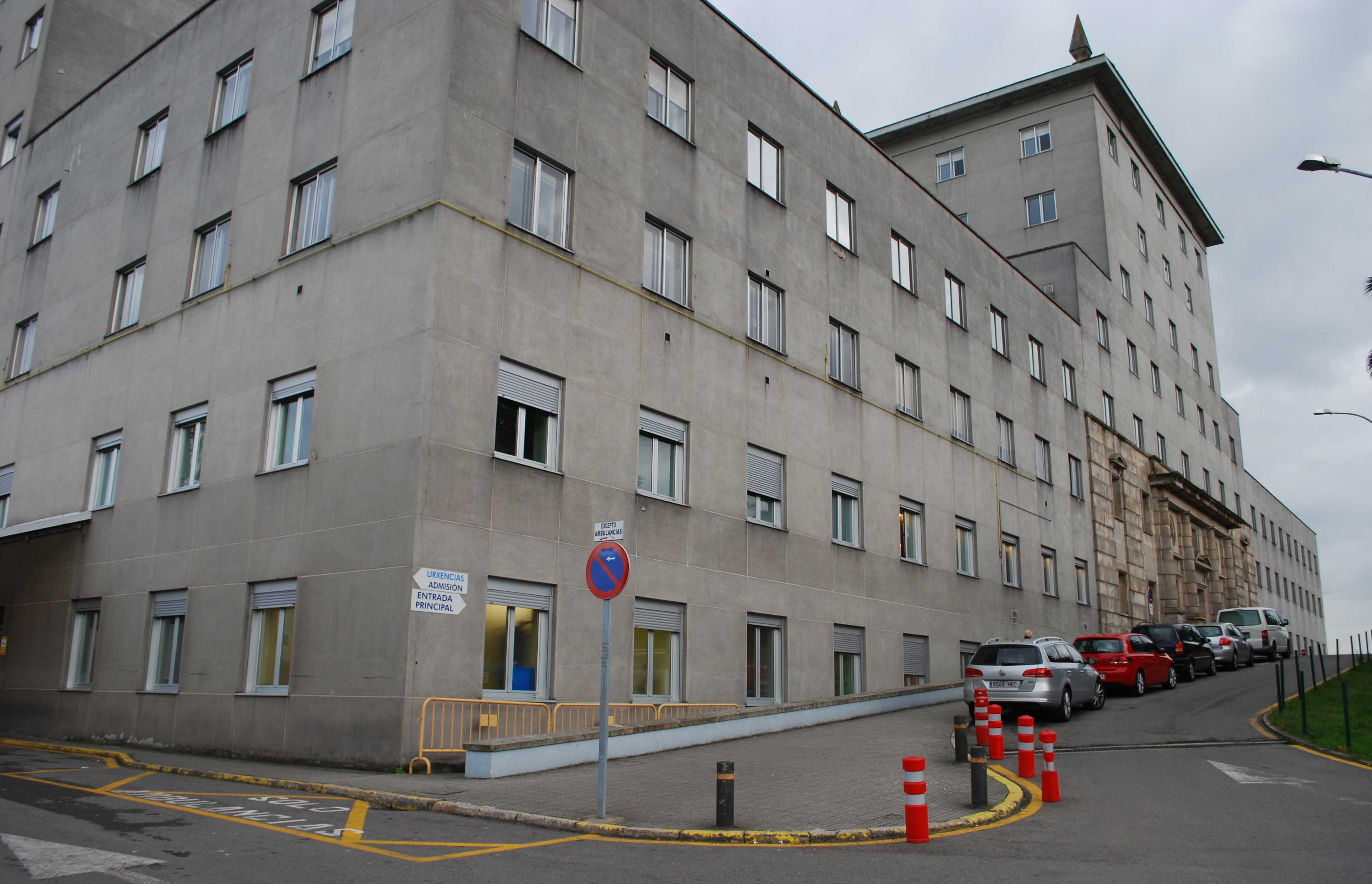 Edificio do Hospital Teresa Herrera (materno infantil) da Coruña, Galiza